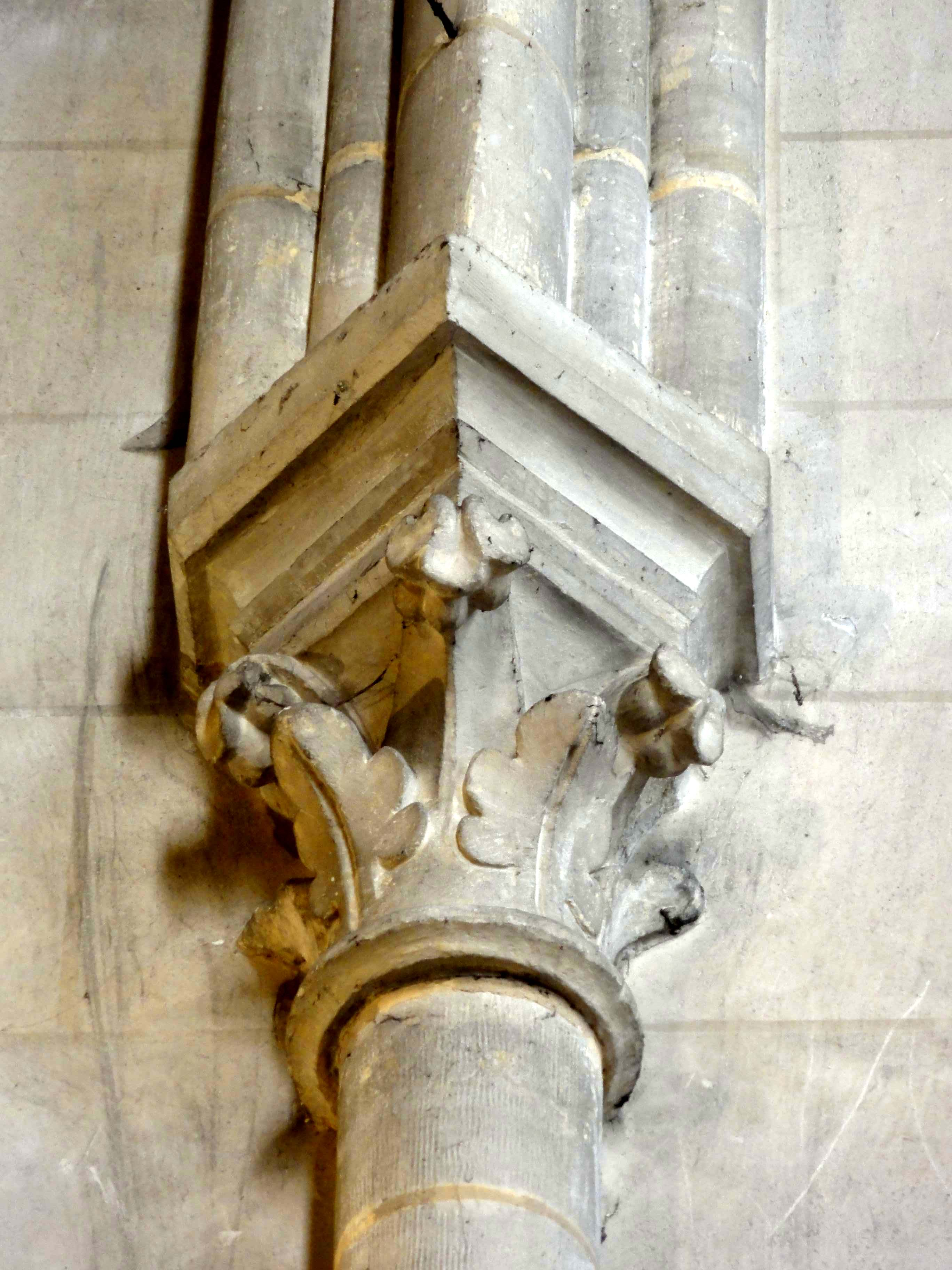 Voir titre.